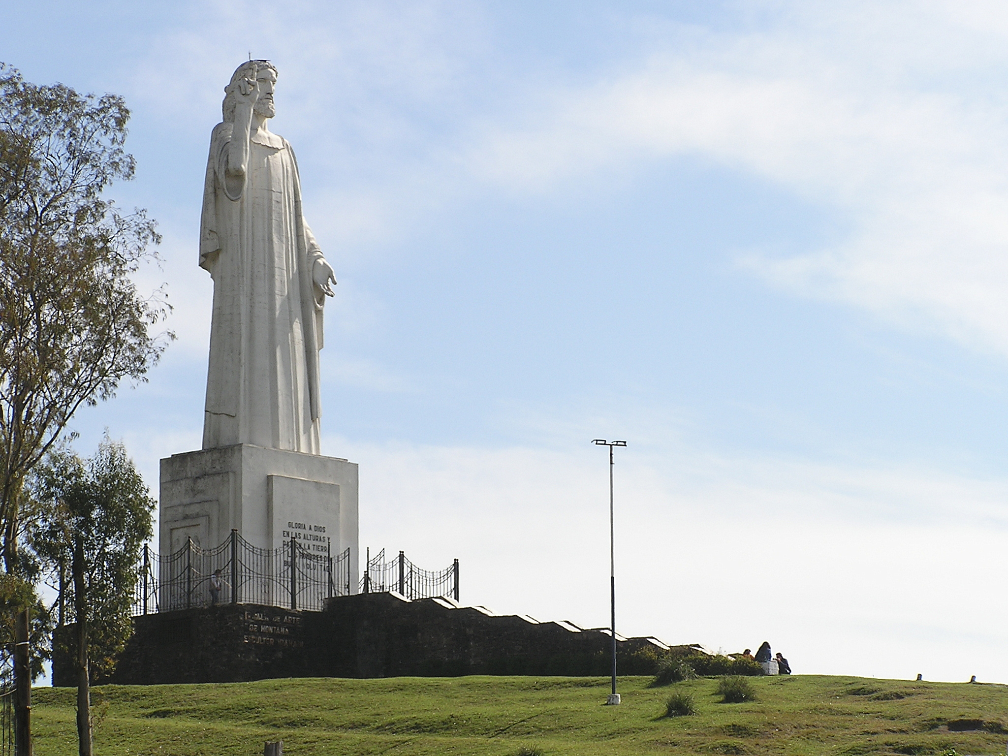 Cristo Redentor en Cerro San Javier